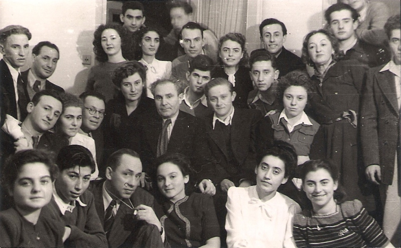 צבי פרידלנד במרכז (בשורה השנייה, חמישי משמאל) ותלמידי המחזור הראשון בבית הספר הדרמטי שליד תיאטרון "הבימה"